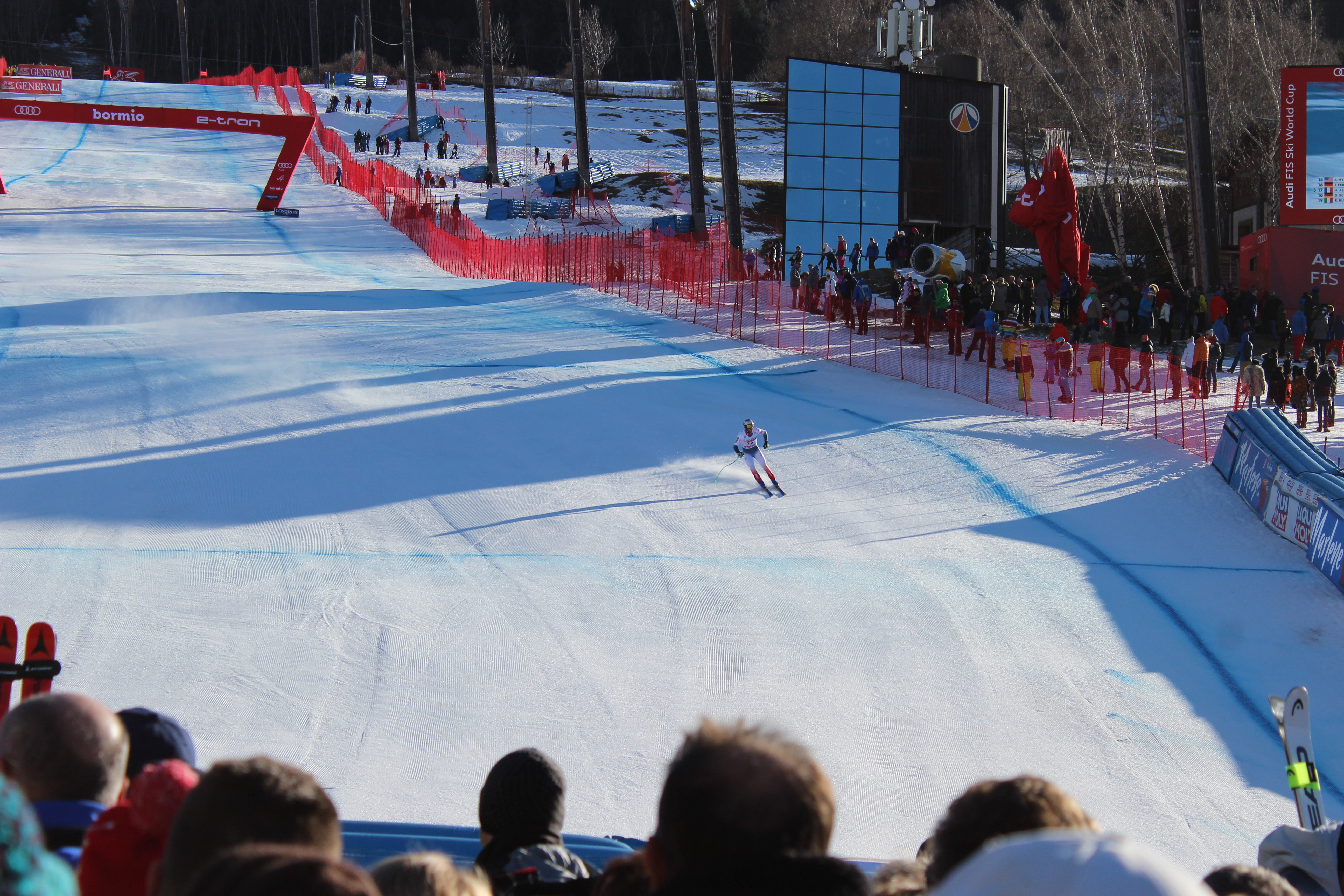 Lo sciatore francese Nils Allègre al traguardo della Pista Stelvio di Bormio, durante la discesa libera del 28 dicembre 2019, valida per la Coppa del Mondo di sci 2019-2020.